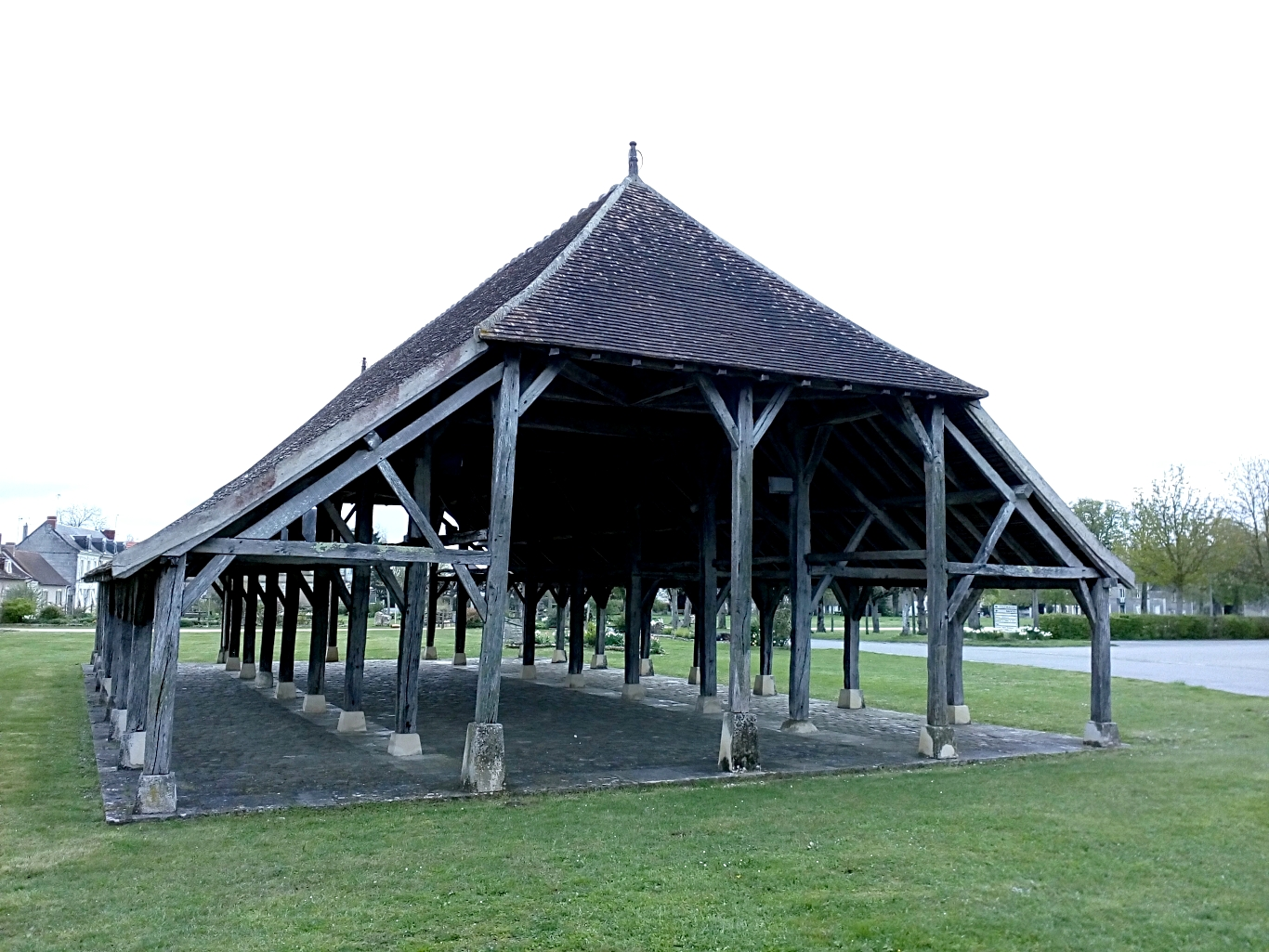 Halles de Scorbé-Clairvaux